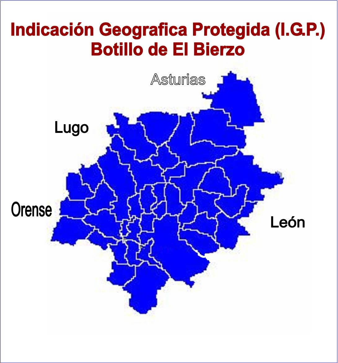 Limites de Indicación geográfica protegida IGP Botillo de El Bierzo